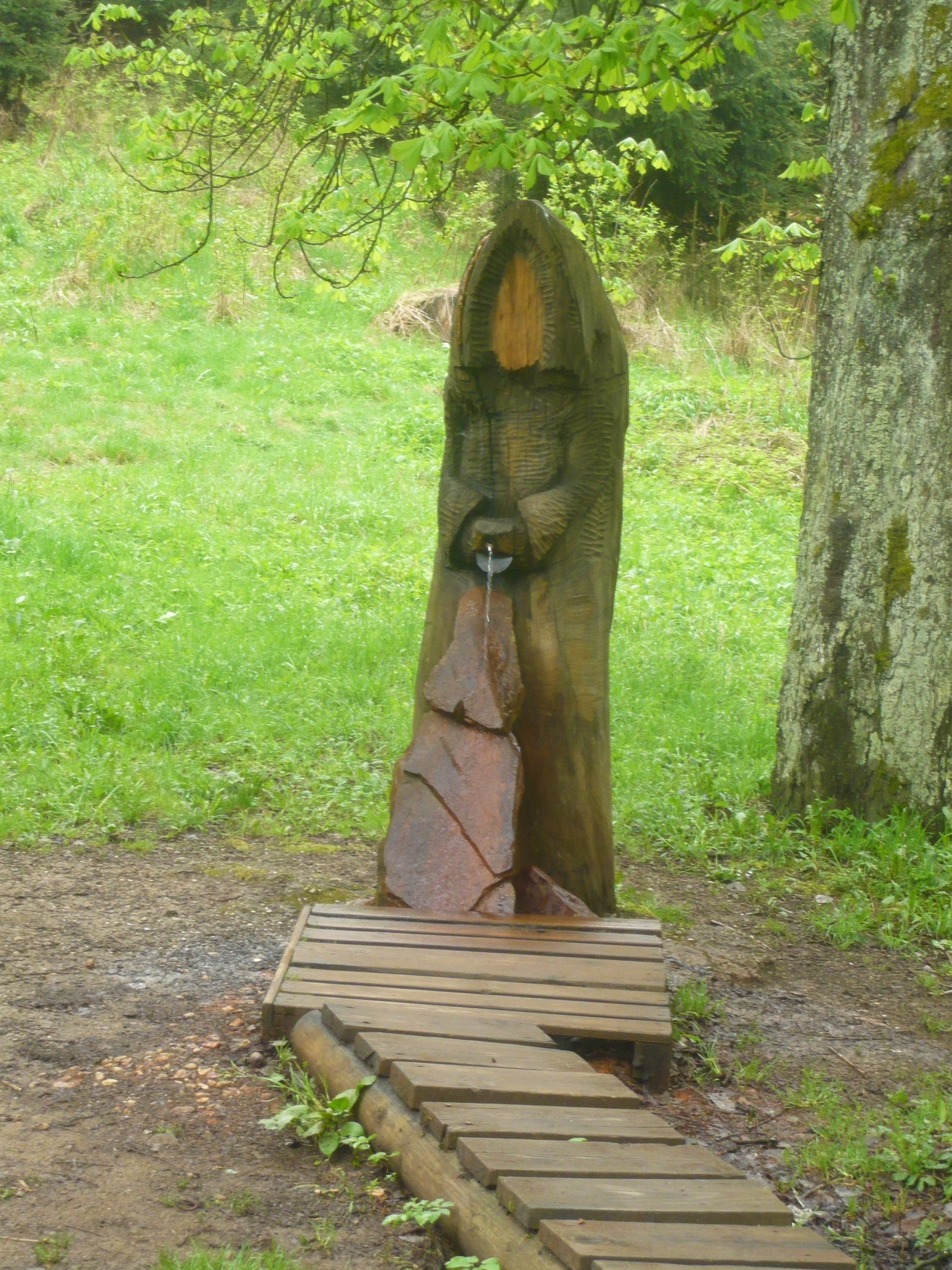 Prelátův pramen - vývěr, Mariánské Lázně